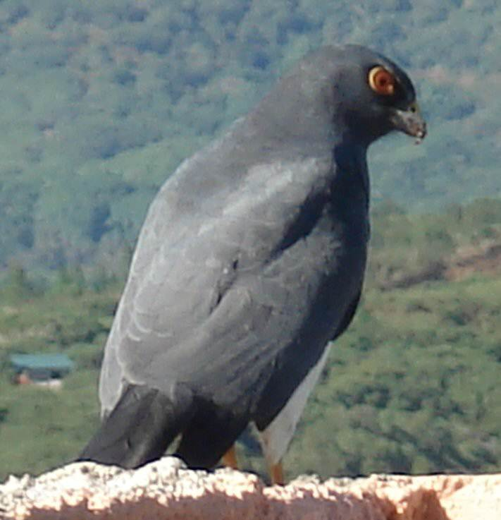 Accipiter haplochrous, Païta, Nouvelle Calédonie 23-08-2012